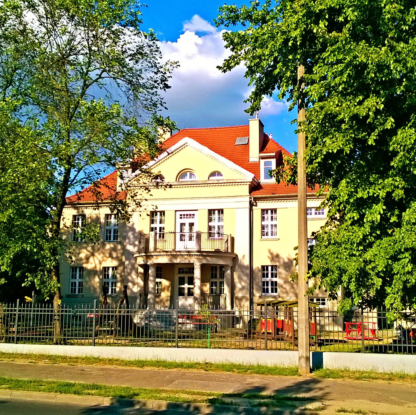 Przedszkole Miejskie nr 6 im. Wandy Chotomskiej w Toruniu